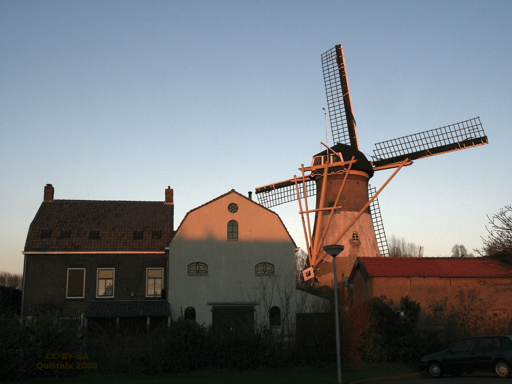 Abbenbroek: korenmolen De Hoop, gezien vanaf de achterzijde